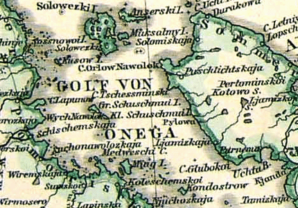 Приведенный фрагмент карты из атласа Стейлера (Stieler's Hand-Atlas) является наиболее точным и четким картографическим описанием тех лет. Размер карты 13х16 дюймов на листе формата 15 1/2 на 19 дюймов.